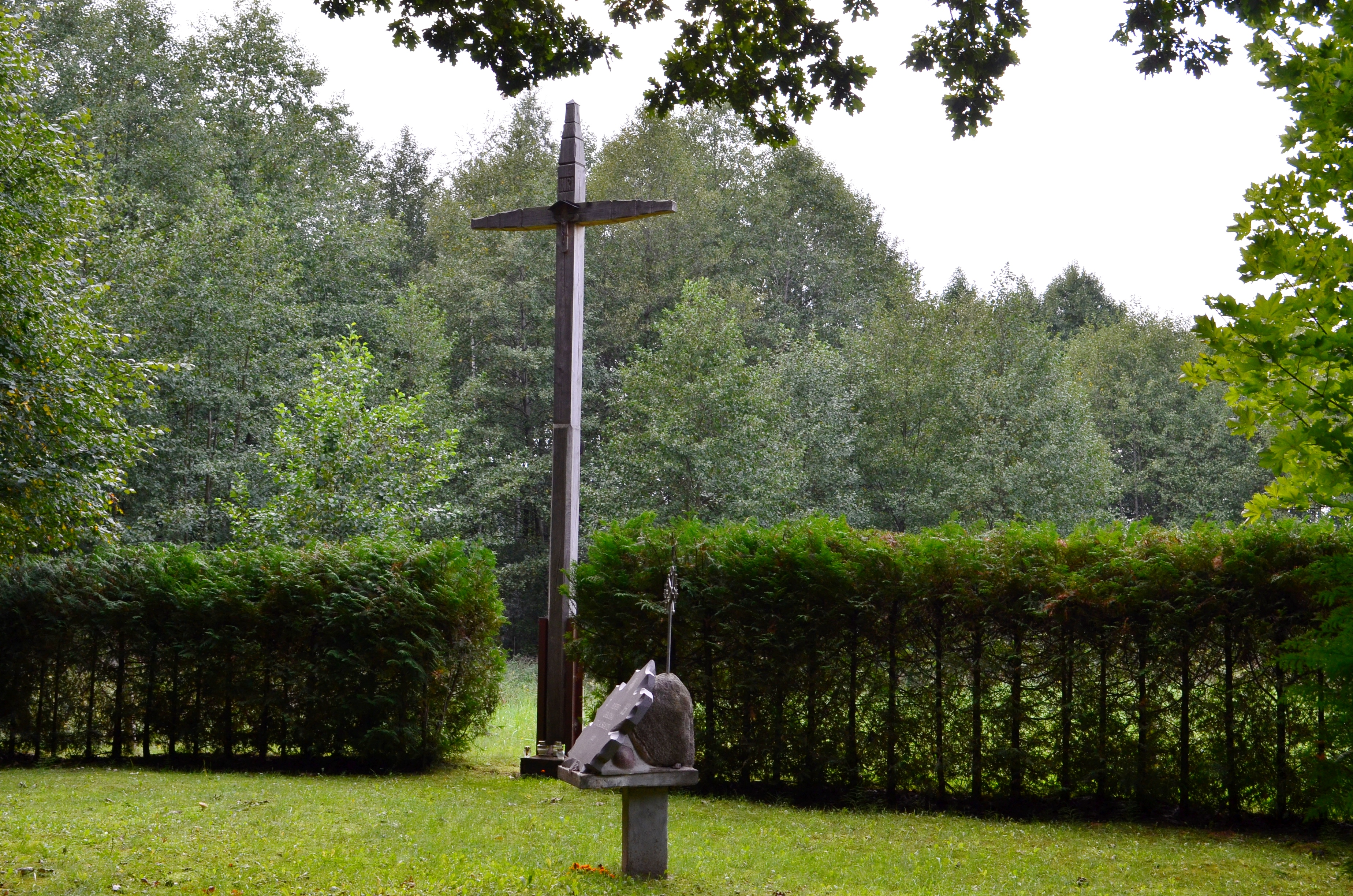 Lekėčių k., Gražinos Tulauskaitės atminimo kryžius, Šakių raj.